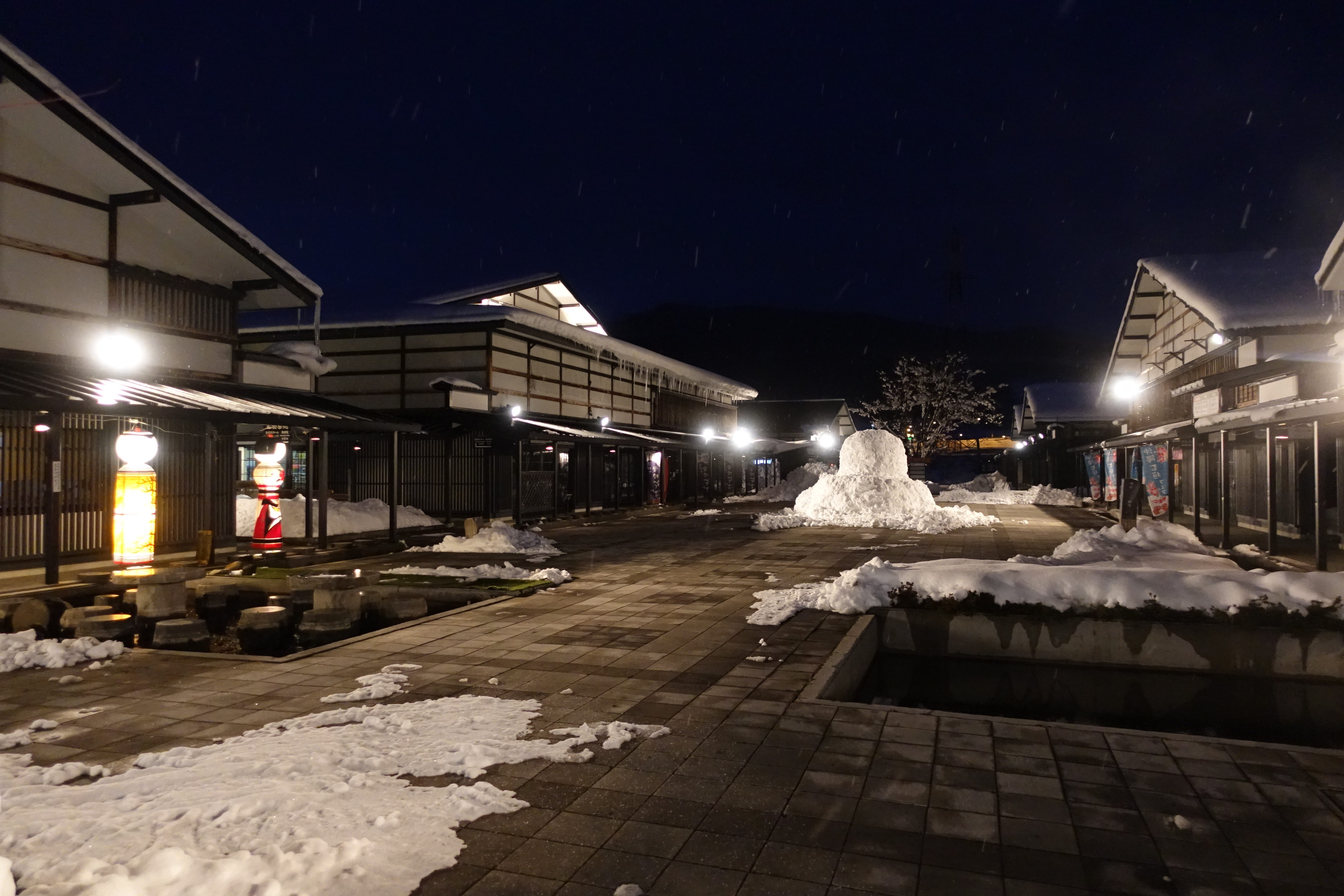 黒石市の津軽伝承工芸館夜景です。